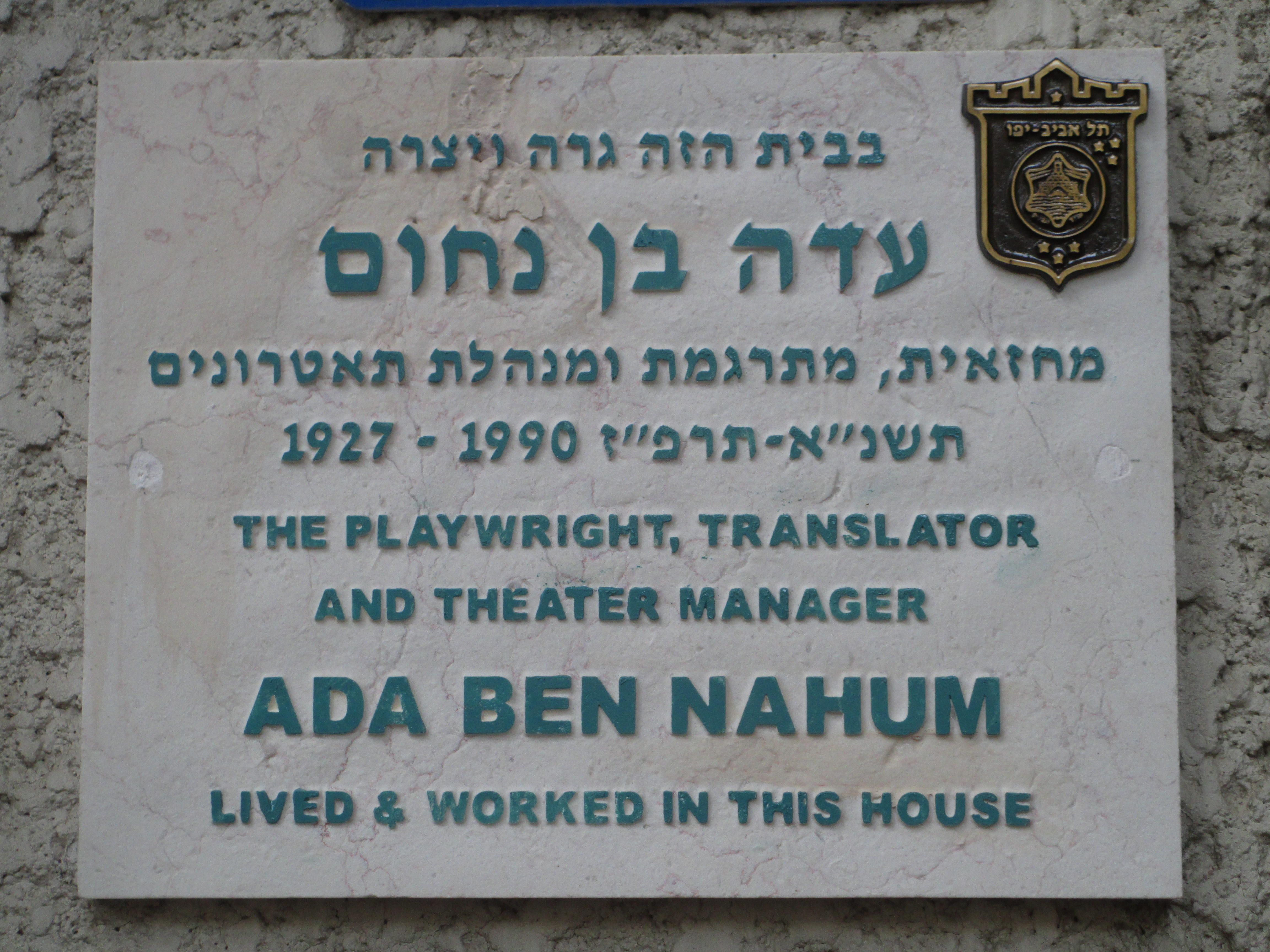 לוחית זיכרון על ביתה של עדה בן נחום ברח' ריינס 52 בתל אביב